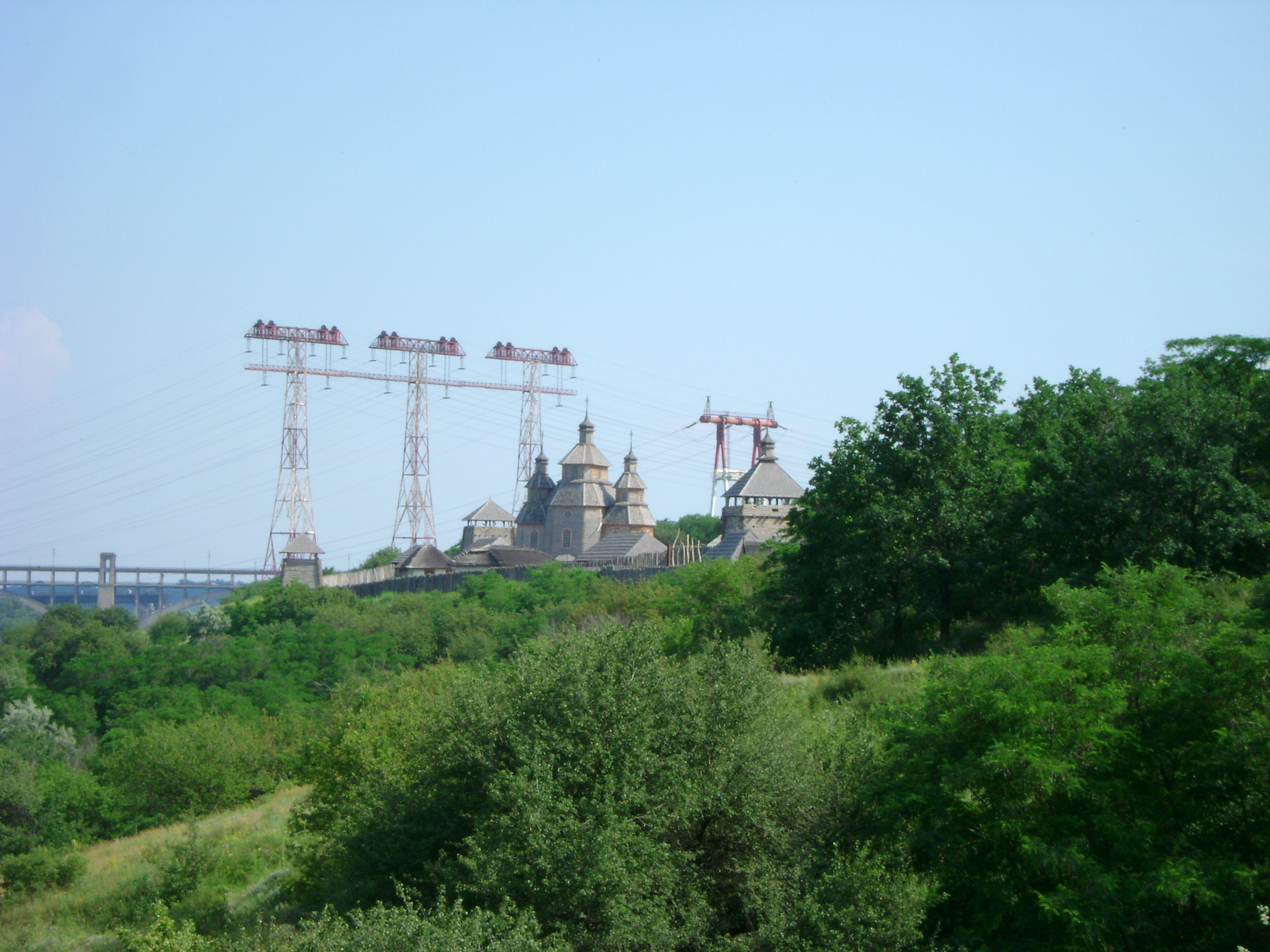 Національний заповідник „Хортиця”, Запоріжжя, острів Хортиця